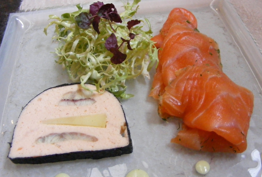 Gravad lax serverad med ålpate